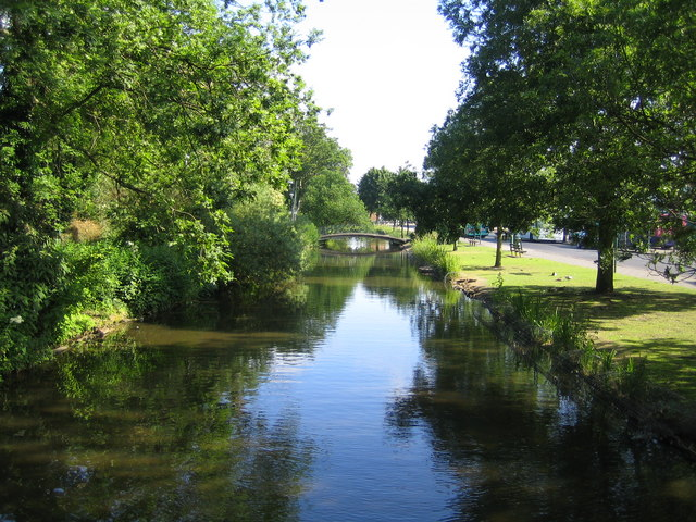 River Gade in Hemel Hempstead